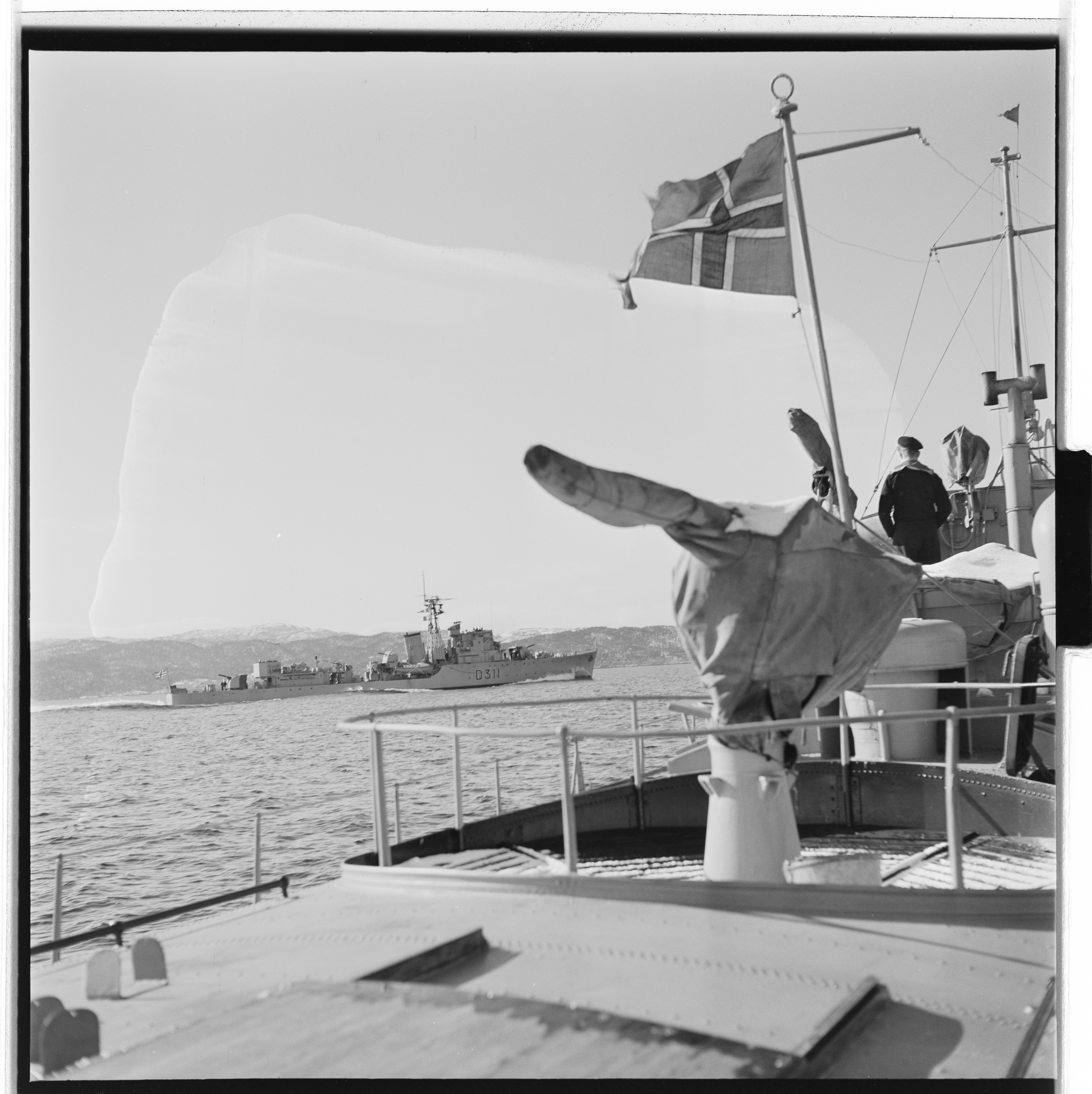 Bildet er hentet fra Arkivverket. Ubåt, K.N.M. Kya. NÅ nr. 17, 1955 Arkivinstitusjon : Riksarkivet Arkivnavn : Billedbladet NÅ Sted : Norge, Ukjent, Ukjent, Ukjent Emneord: Ubåter, Menn, Maritimt Avbildet